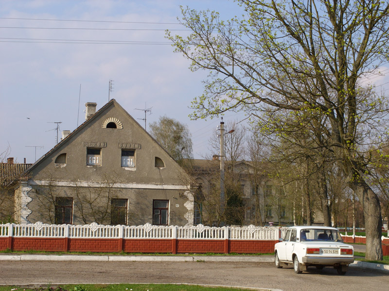 Беларуская (тарашкевіца): Даўні банк у Антопалі